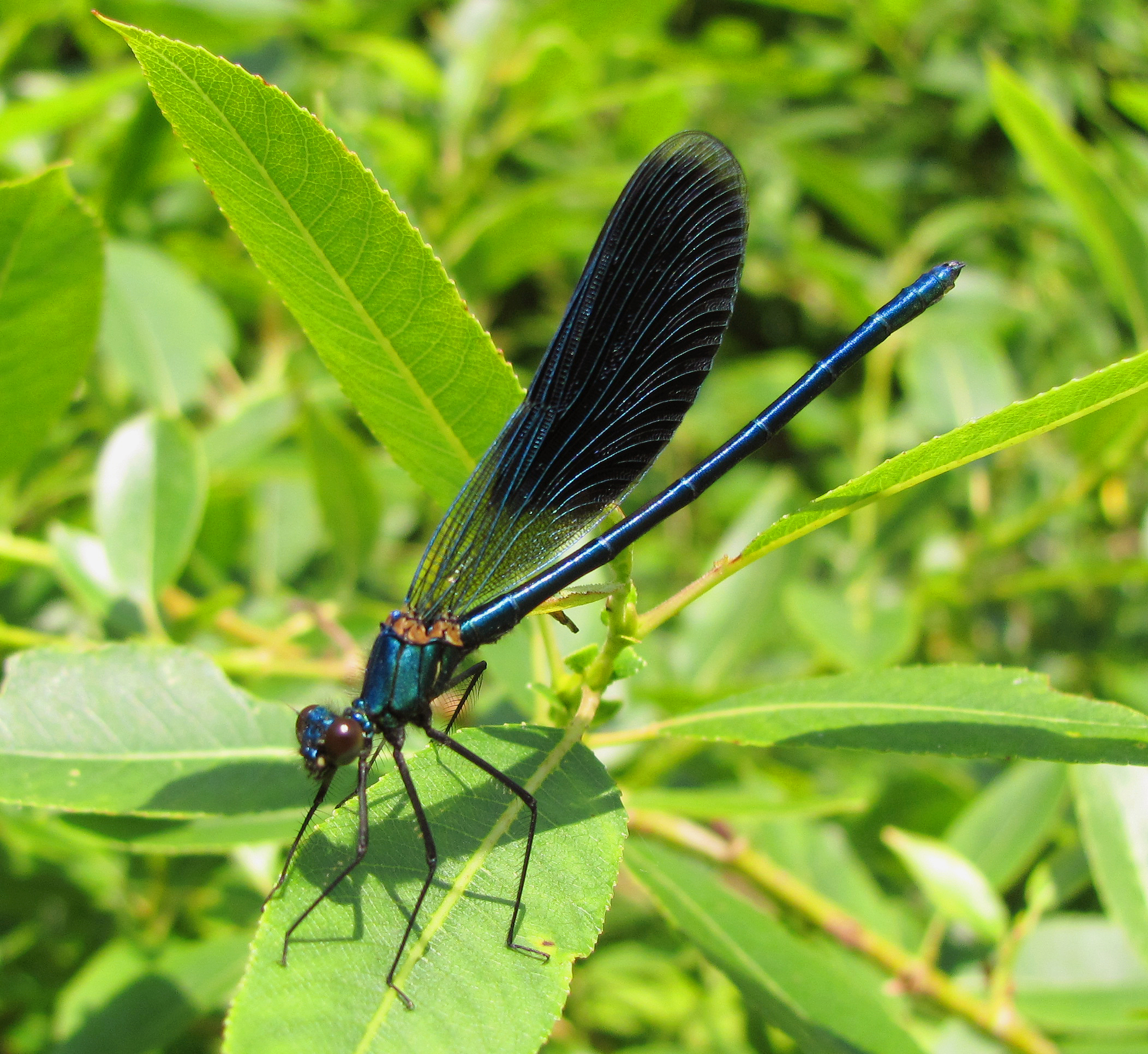 Calopteryx virgo Красотка-девушка Beautiful demoiselle Male